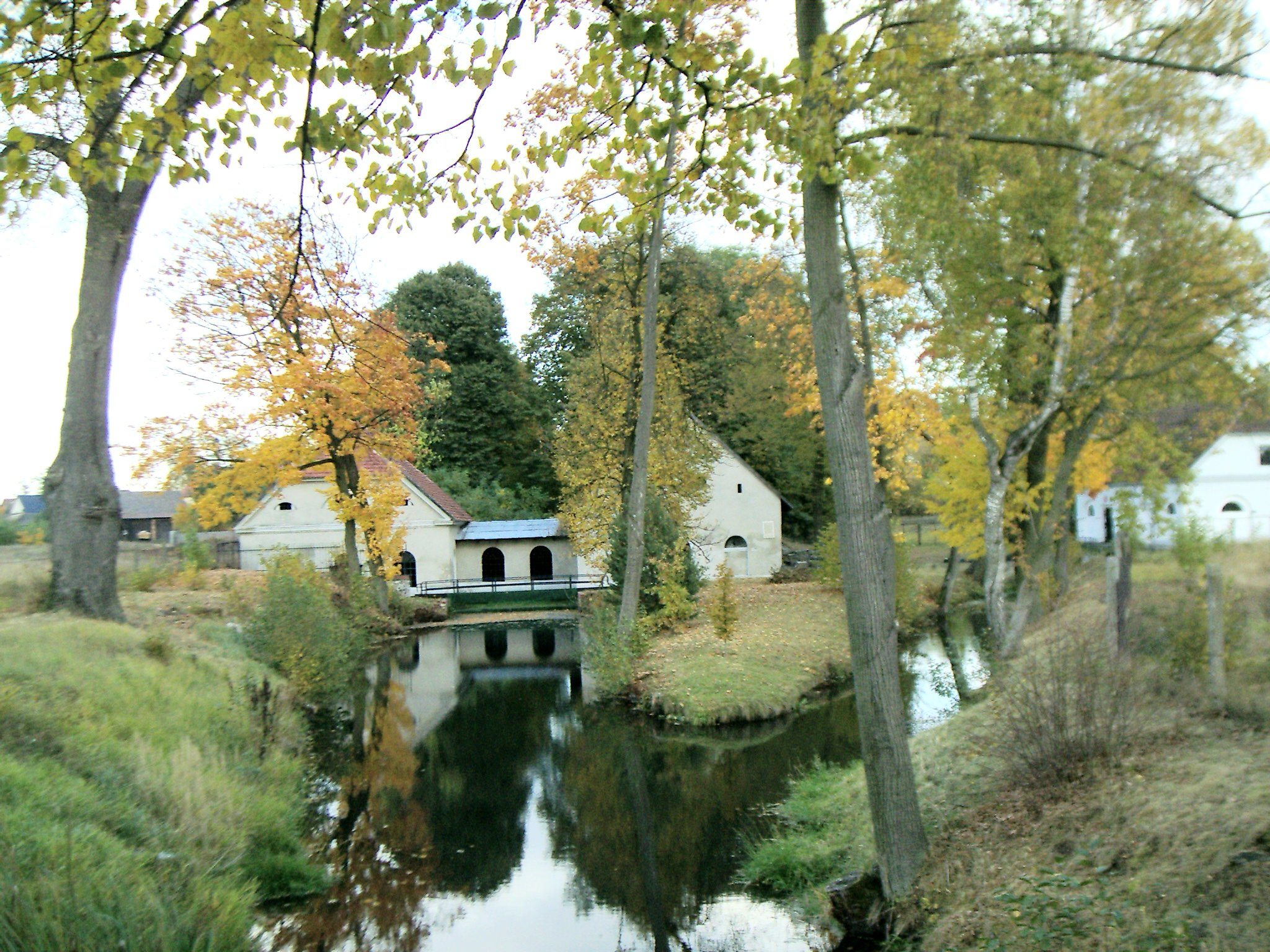 Zagwiździe - kanał doprowadzjący wodę do kuźni